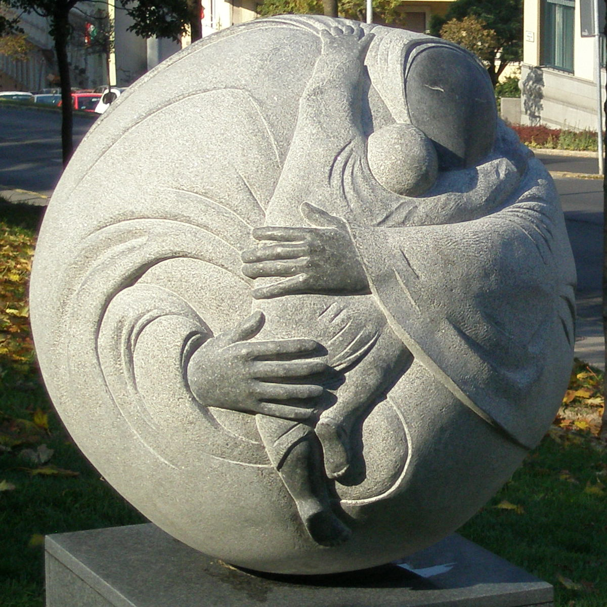 Wagner Nándor Földanya szobra (Budapest I., Ostrom utca és Lovas utca sarka)